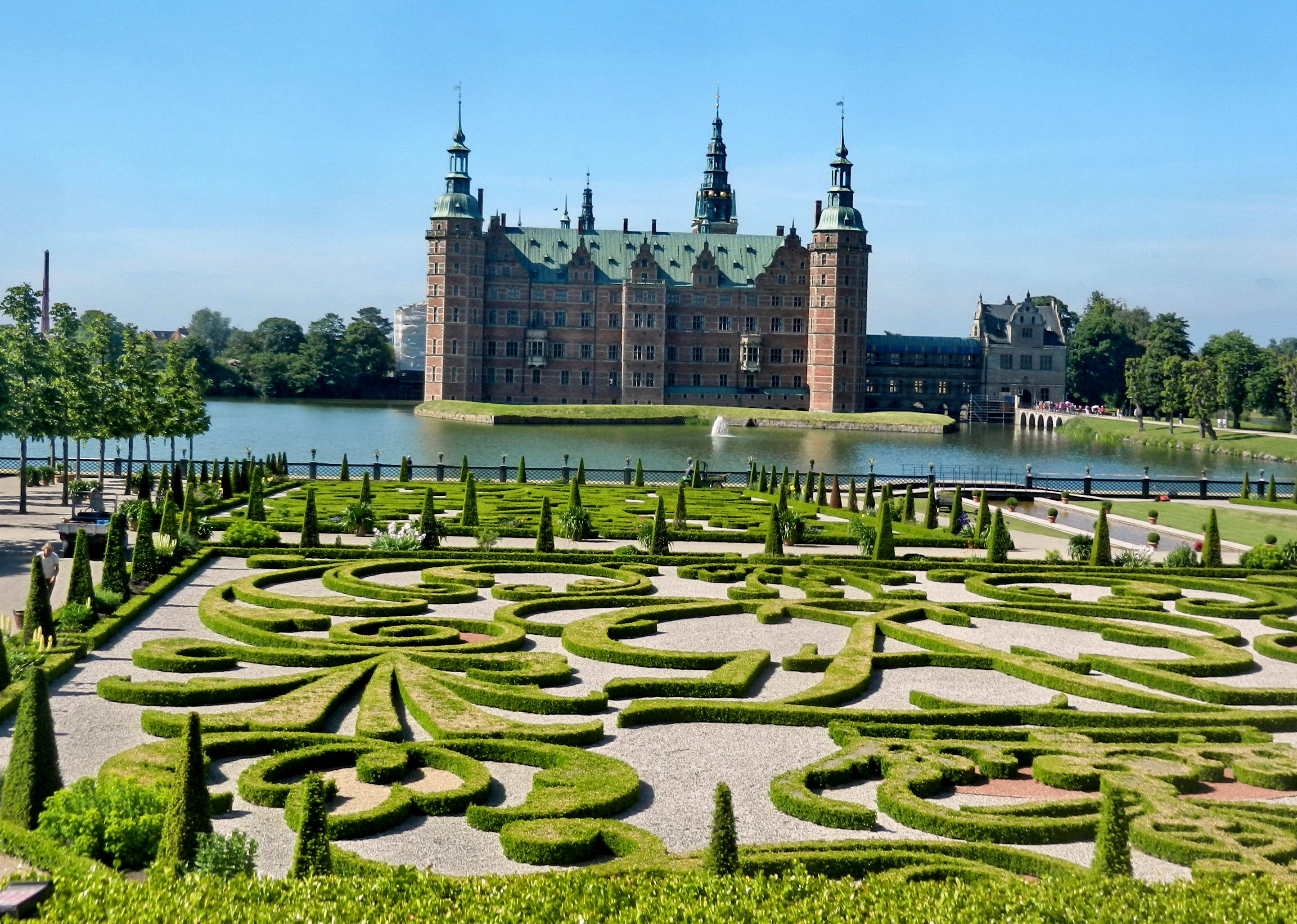 Frederiksborg castle